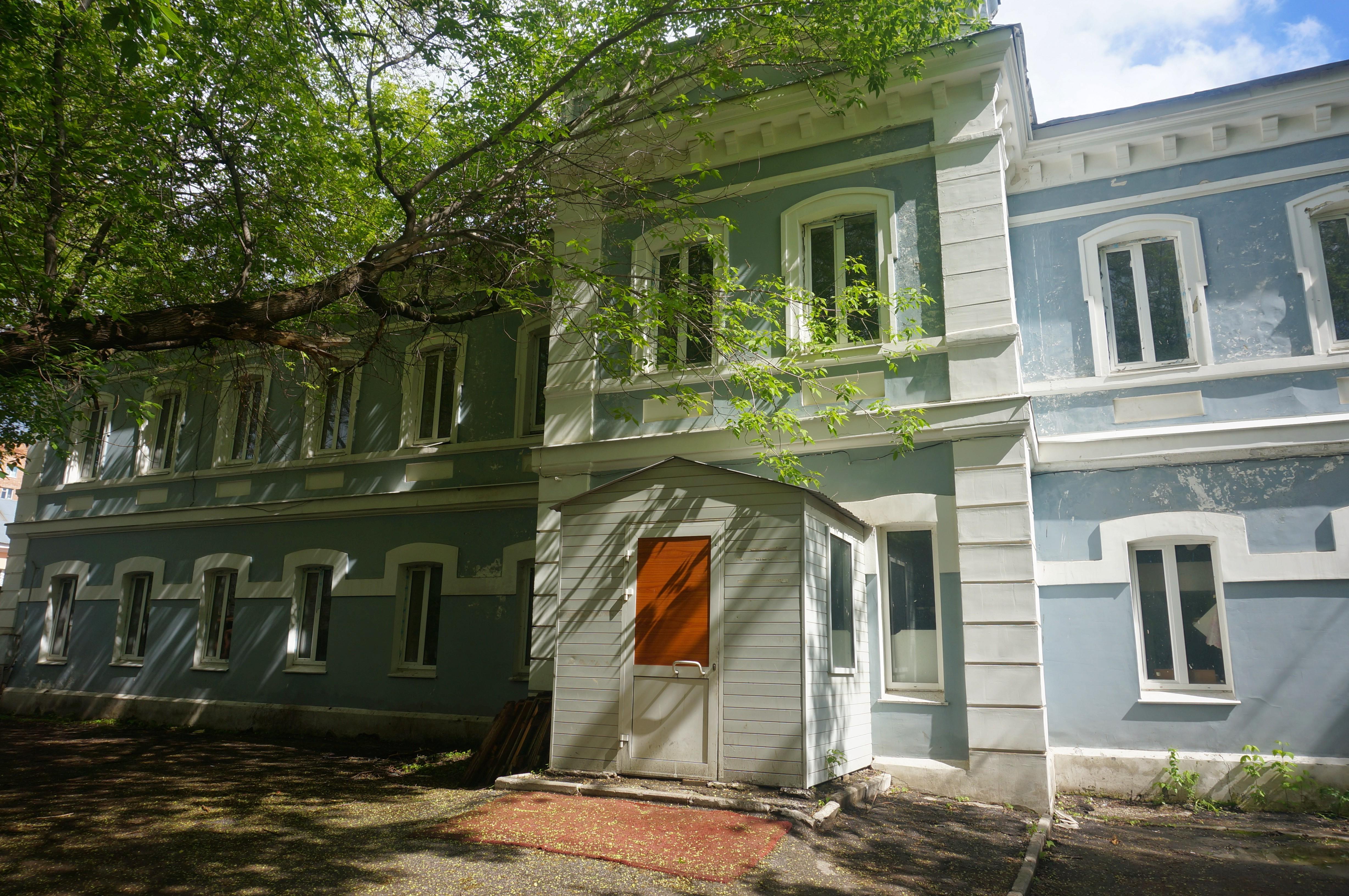 Фасад здания по ул. Осипенко 10а, Самара. Некогда келейный корпус Самарского Николаевского мужского монастыря. 1915 год постройки